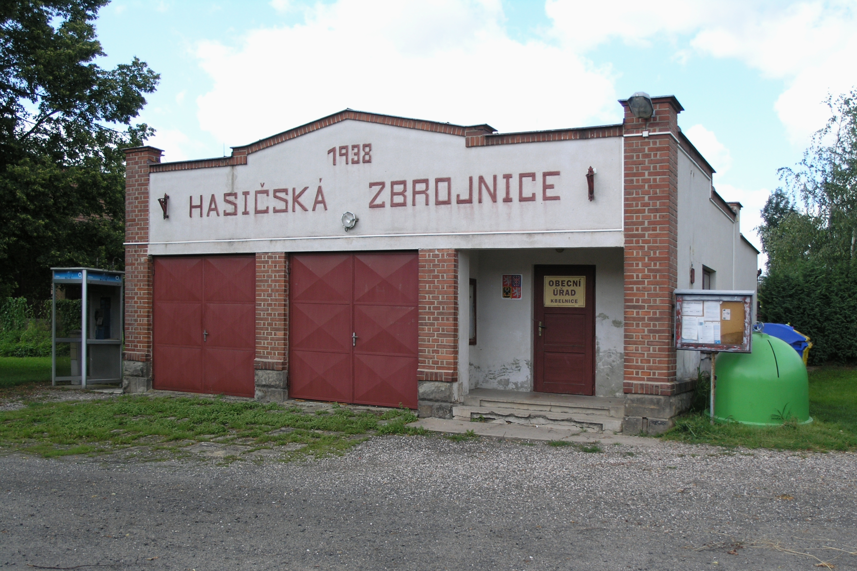 Kbelnice - obecní úřad a hasičská zbrojnice